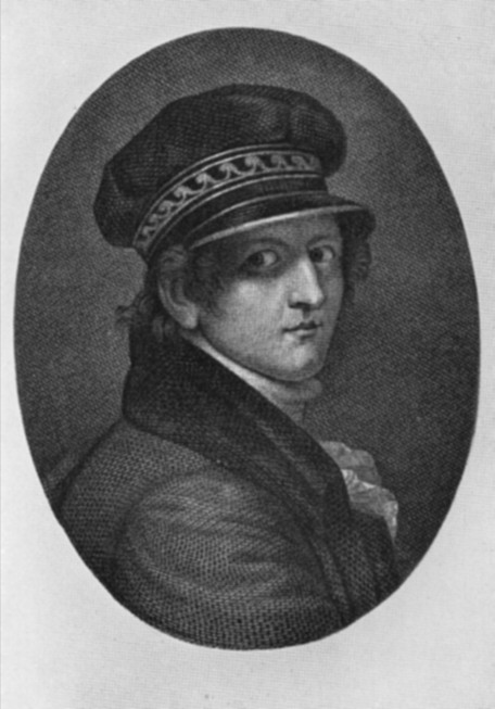 Gerhard von Kügelgeln (1772-1820)